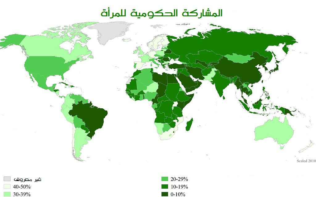 بيان المشاركة الحكومية للمرأة